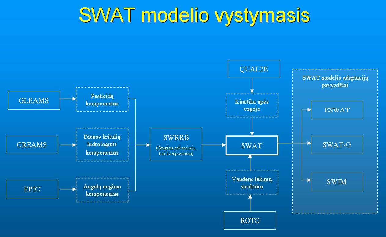 SWAT modelio vystymasis